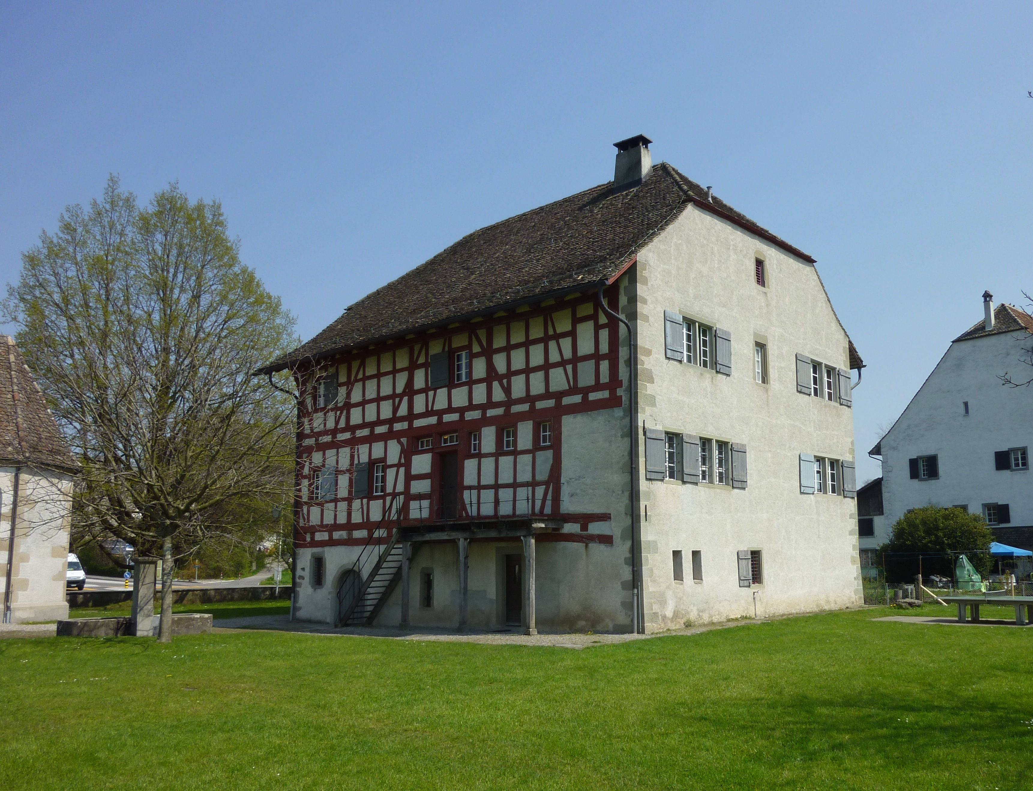 Ritterhaus Uerikon